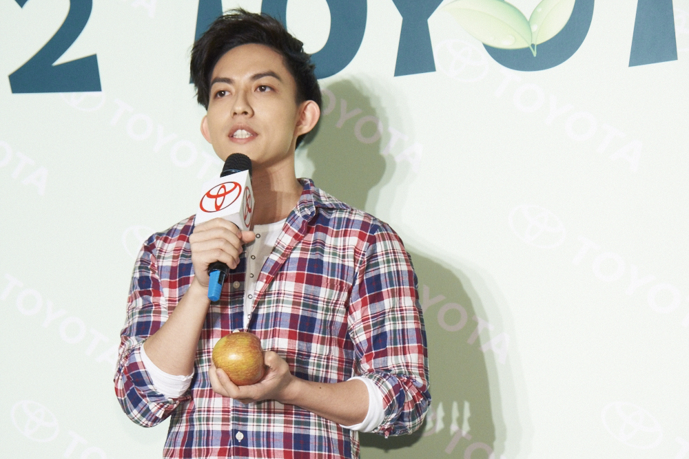 台灣藝人林宥嘉